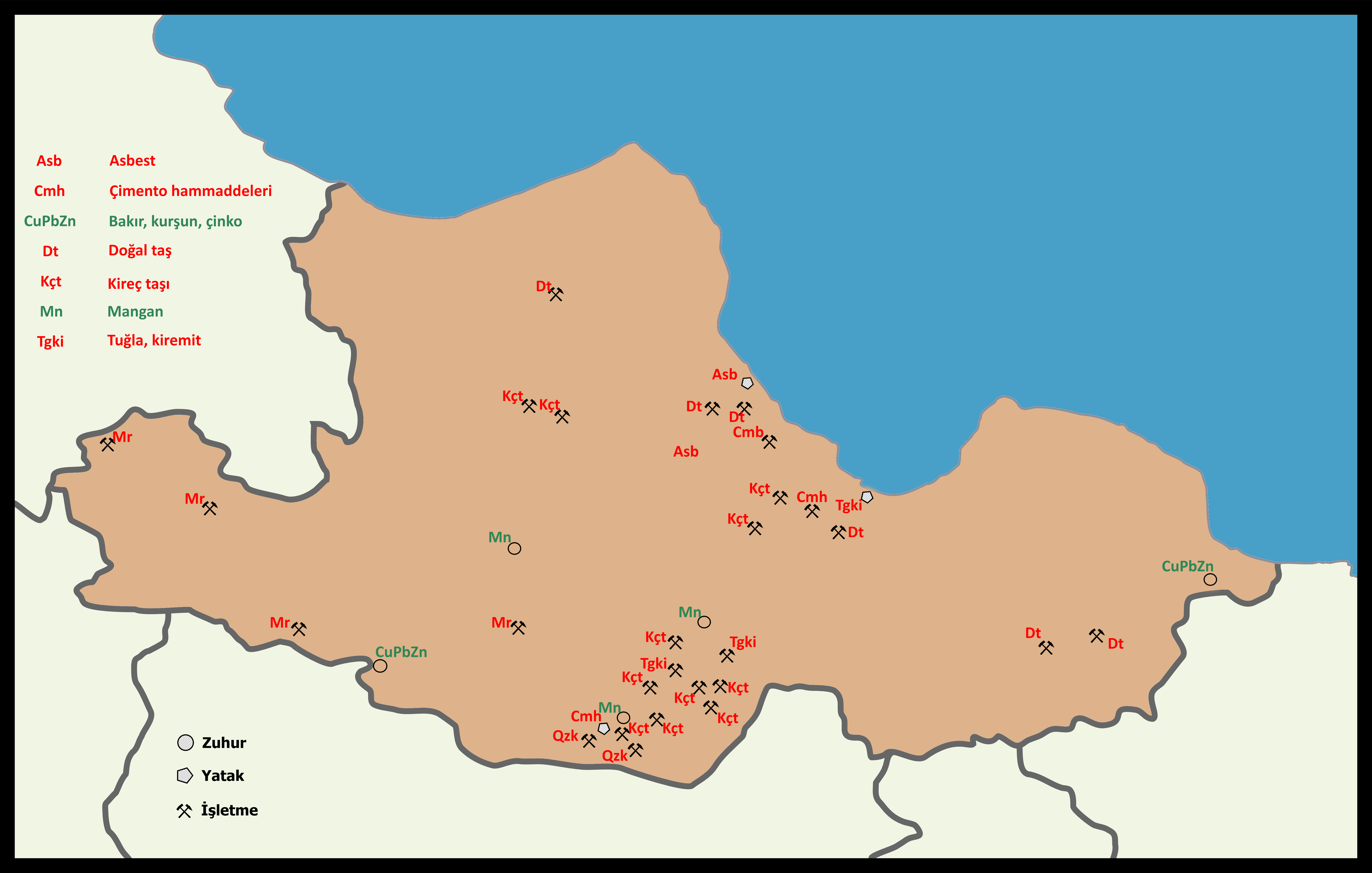 Maden Tetkik ve Arama Genel Müdürlüğünün 2012 yılı verilerine göre Samsun'daki maden varlığına ve işletmelerine dair harita.